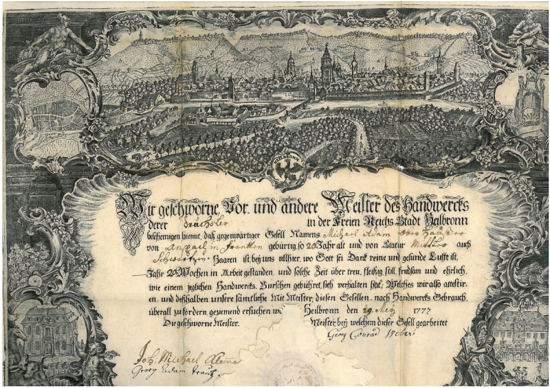 Kundschaft (Arbeitsbescheinigung) für Handwerksgesellen, Vordruck mit Westansicht der Stadt Heilbronn. Ausgefüllt vom Drechslerhandwerk für den Gesellen Michael Adam Oberhauser aus Ansbach, mit Unterschrift des Heilbronner Drechslermeisters Georg Conrad Weber.